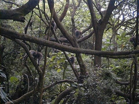 Macaques de Formose, Macaca cyclopis dans leur environnement naturel. Photographie de Minna J. Hsu avec son aimable autorisation.